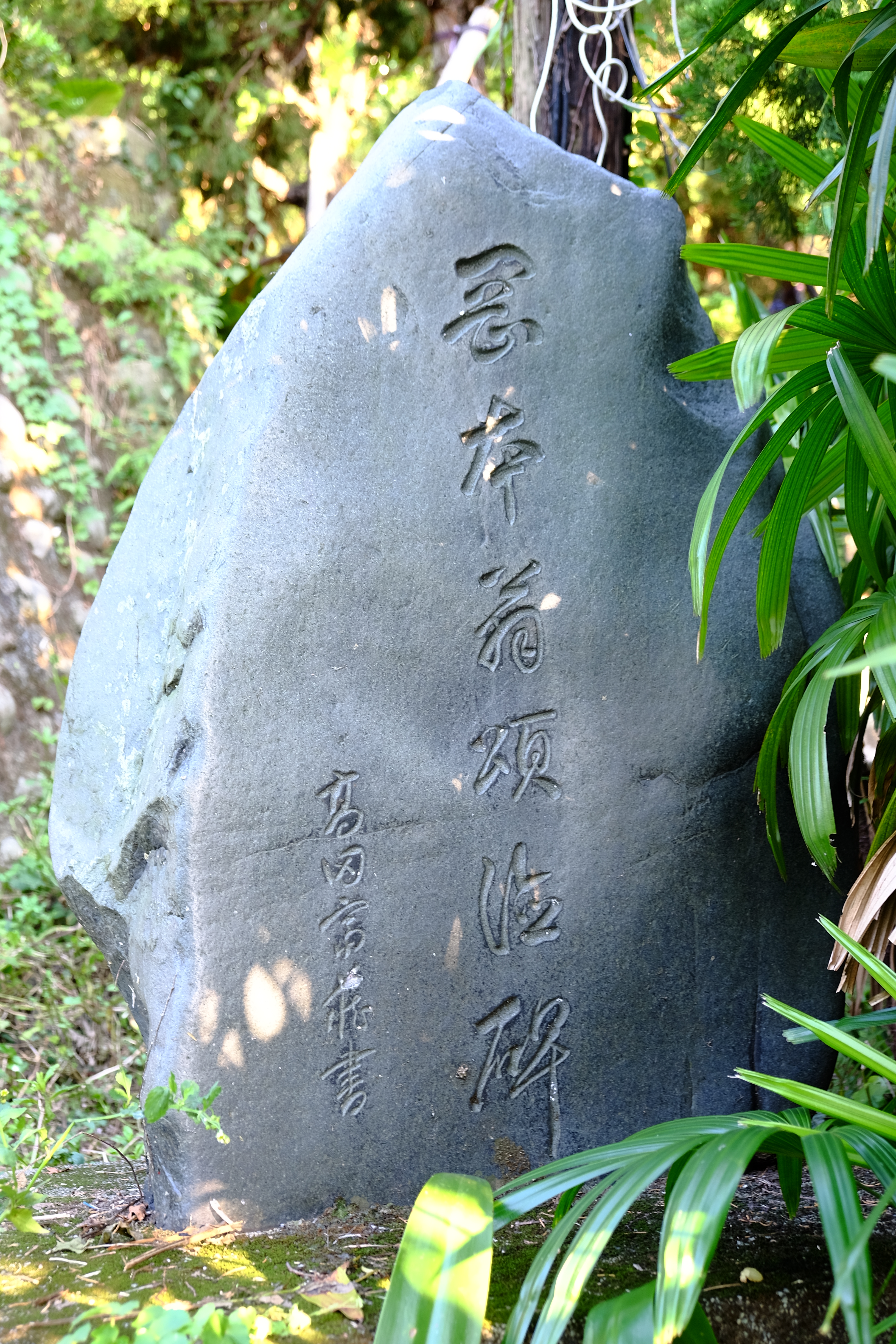 中文（台灣）: 新北投善光寺岡本翁頌德碑正面